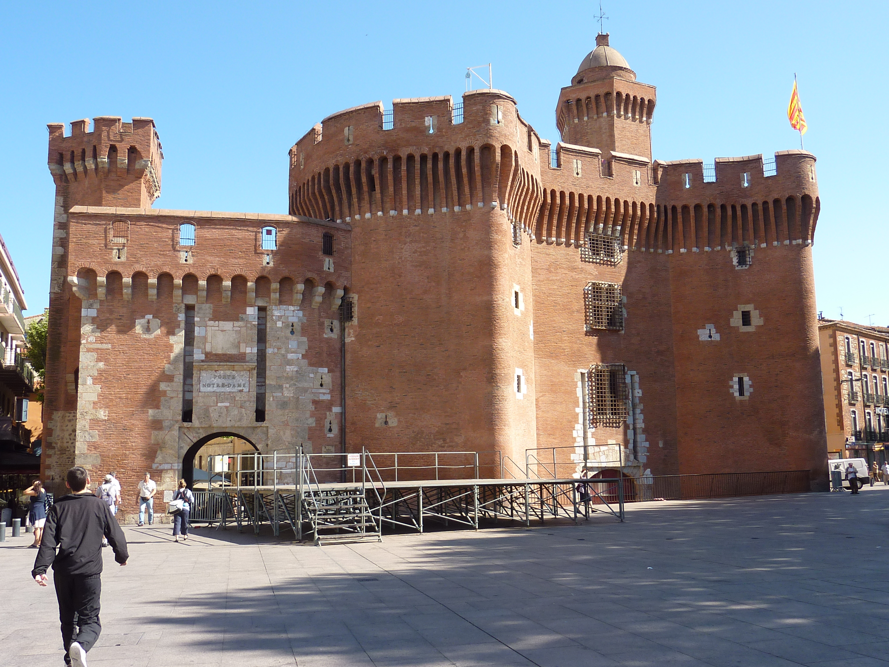 Perpignan: le Castillet (Porte Notre-Dame)